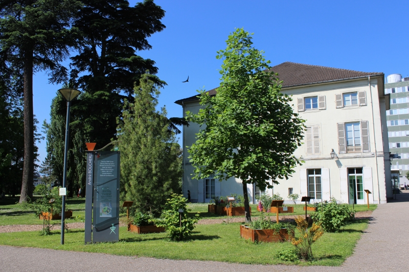 Photo de l'entrée du jardin